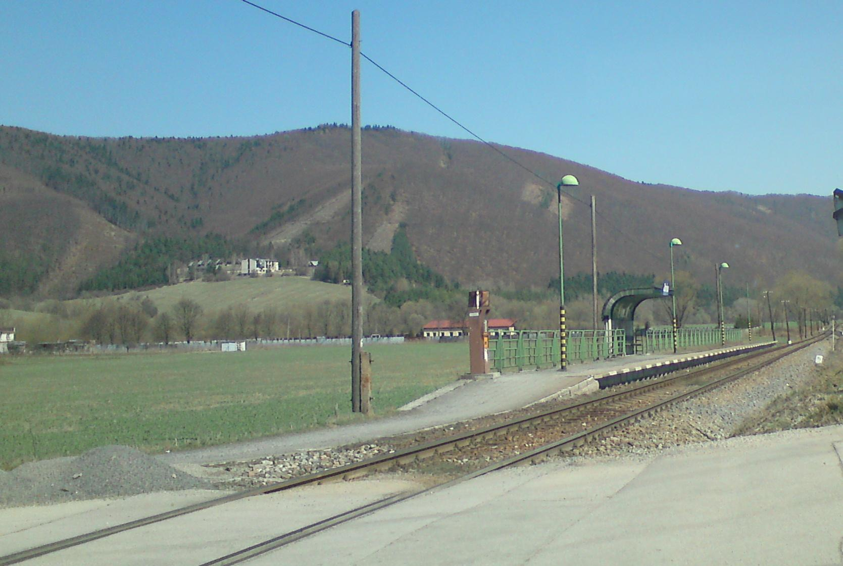 Zastavka Zbynov na trati Zilina - Rajec